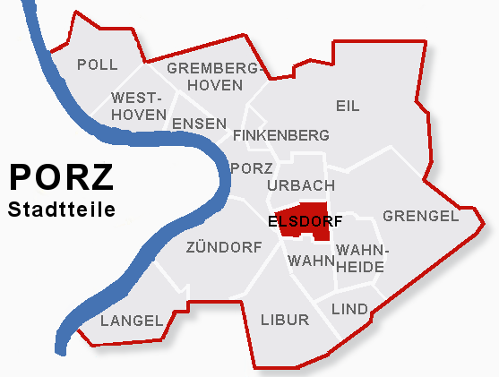 Lage des Stadtteils Elsdorf im Stadtbezik Porz